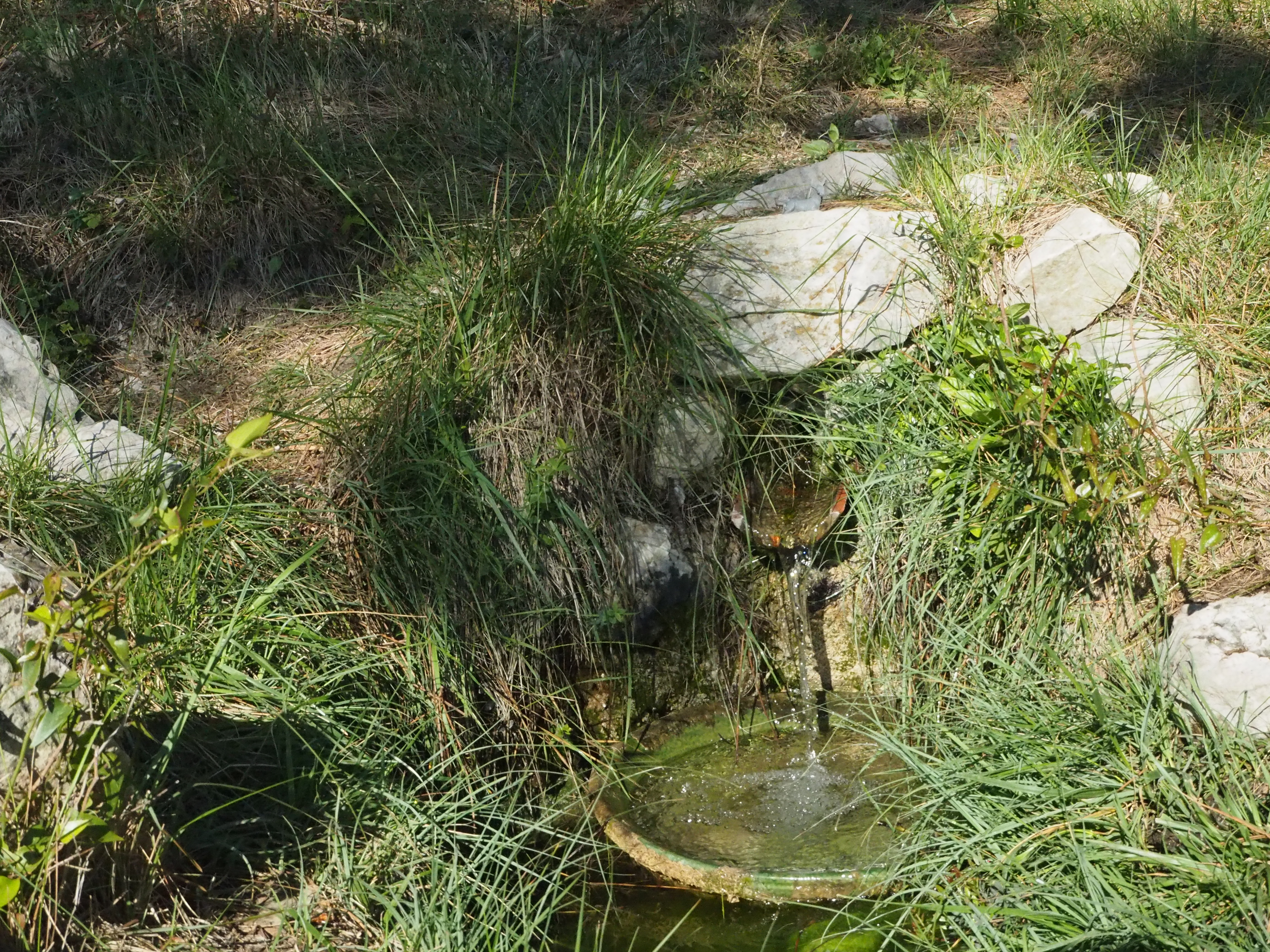 Font del Llibrell. Ròtova